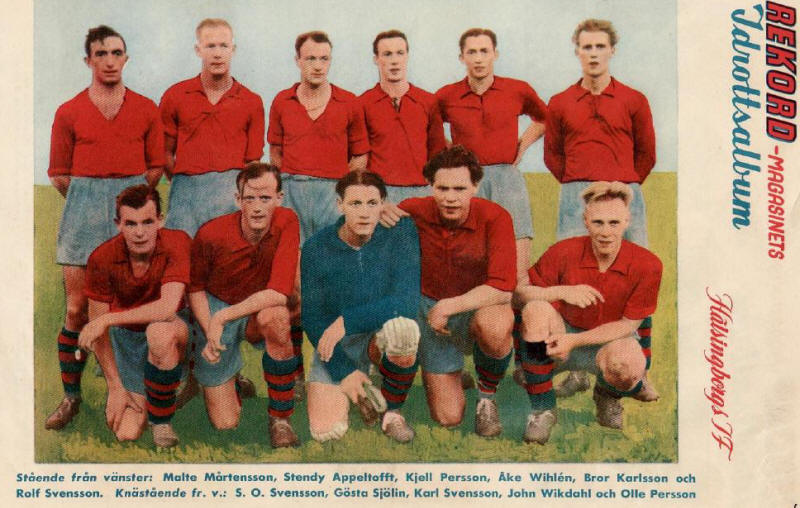 Hälsingborgs IF på Olympia den 30 juli 1944 inför en allsvensk match mot Halmstads BK. Resultat: 1-2.